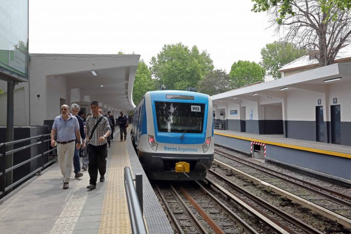 Estación Juan B. Justo de la línea Mitre en octubre de 2017.